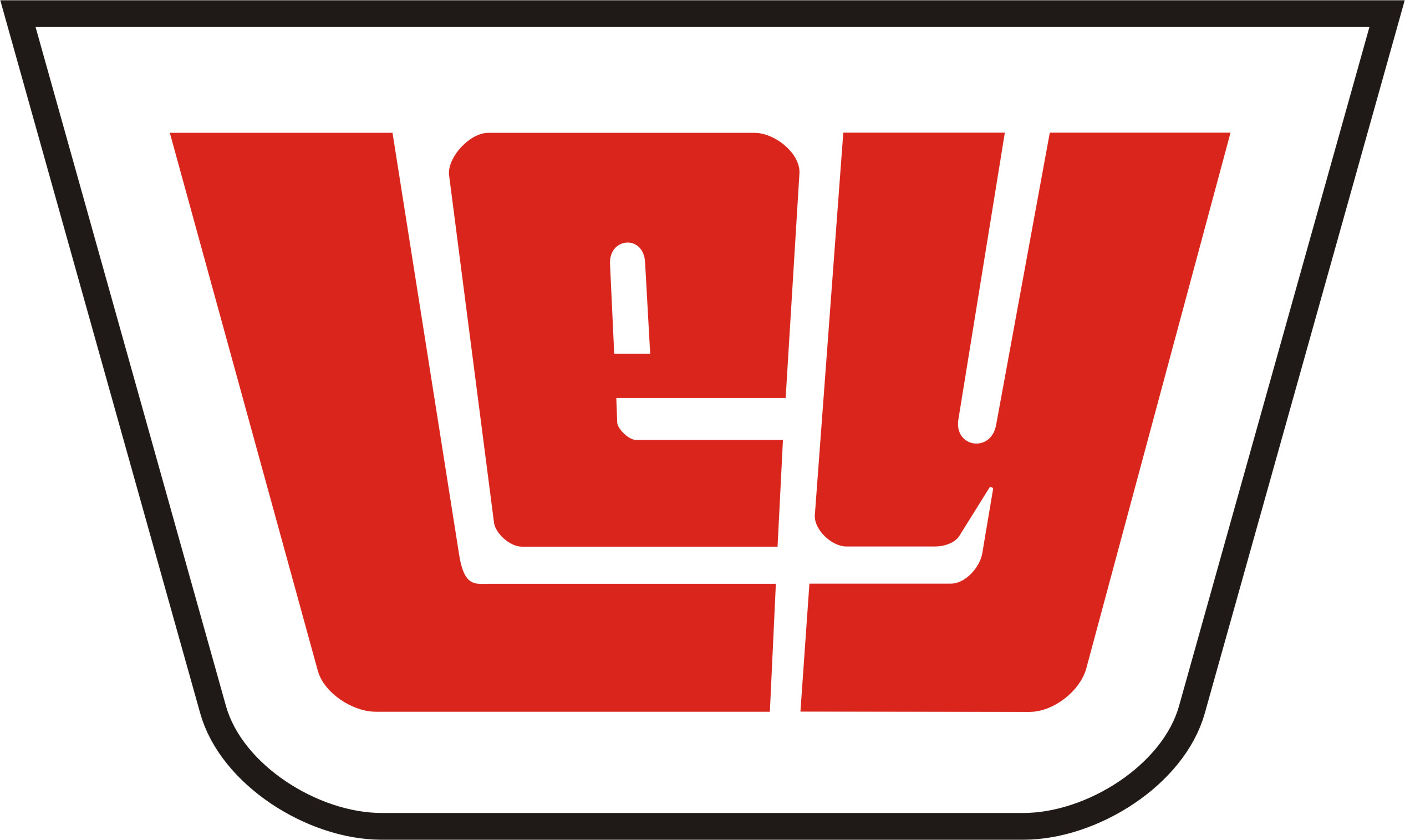 Logo Institucional